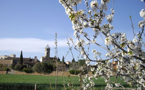 Prespectiva de Jafre a la primavera